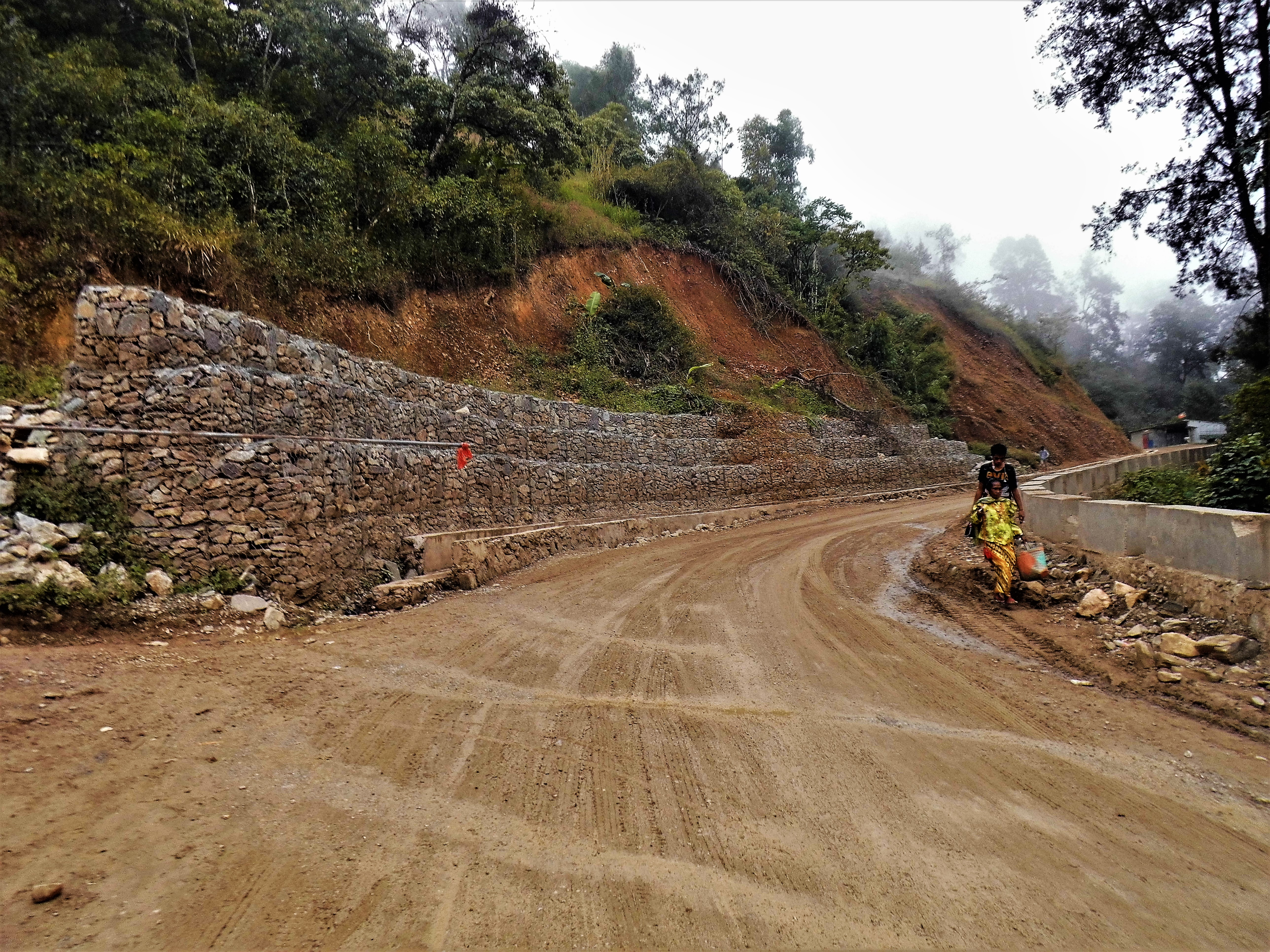 Straße in Maubisse